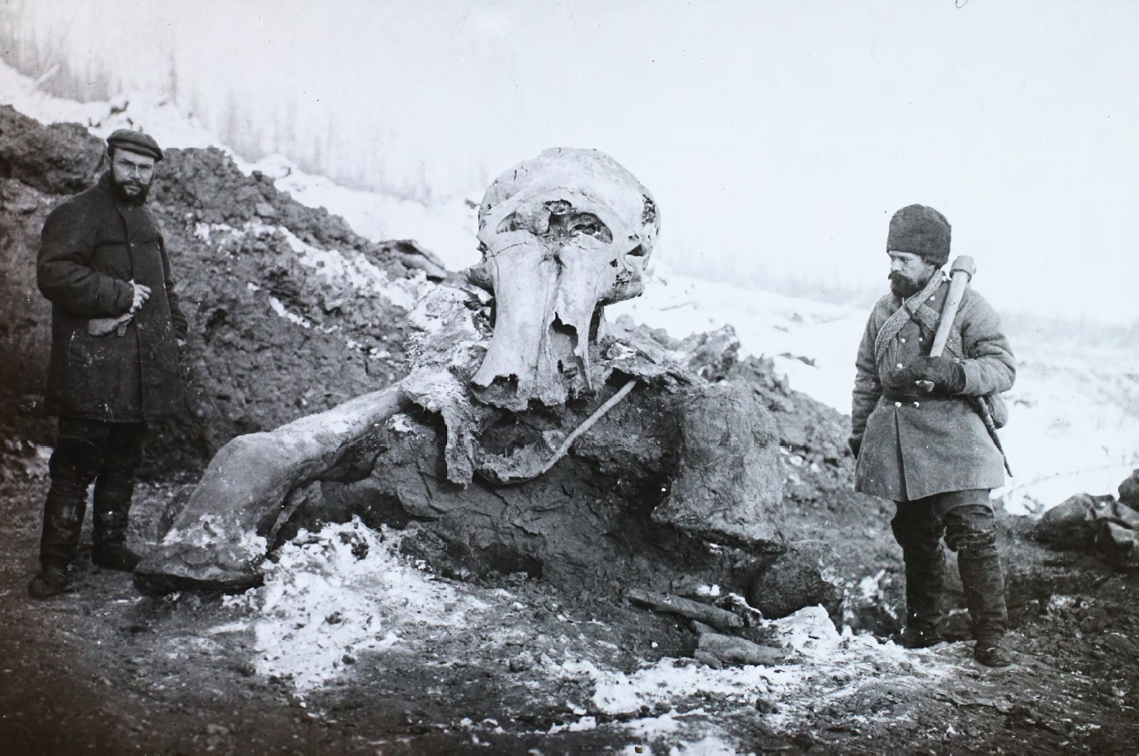 Труп березовского мамонта на месте раскопок. Палеонтолог Евгений Пфиценмайер и неизвестный участник экспедиции